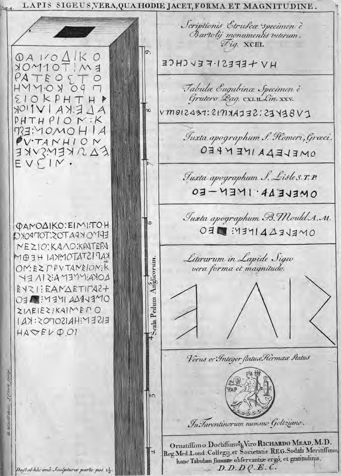 Η μαρμάρινη στήλη του Σίγειου σε δημοσίευση του 1728, ύψους 2,31 μέτρων, αποτελεί σπάνιο δείγμα ελληνικού αλφαβήτου, γραμμένο στην αποκαλούμενη “βουστροφηδωνική”. Θεωρείται ως η παλαιότερη σωζόμενη ελληνική επιγραφή, χρονολογούμενη γύρω στο 550 π.Χ. Το κείμενο της επιγραφής αποτυπώνεται σε δύο ελληνικές διαλέκτους, την Ιωνική και την Αττική. Σήμερα βρίσκεται στο Βρετανικό Μουσείο.